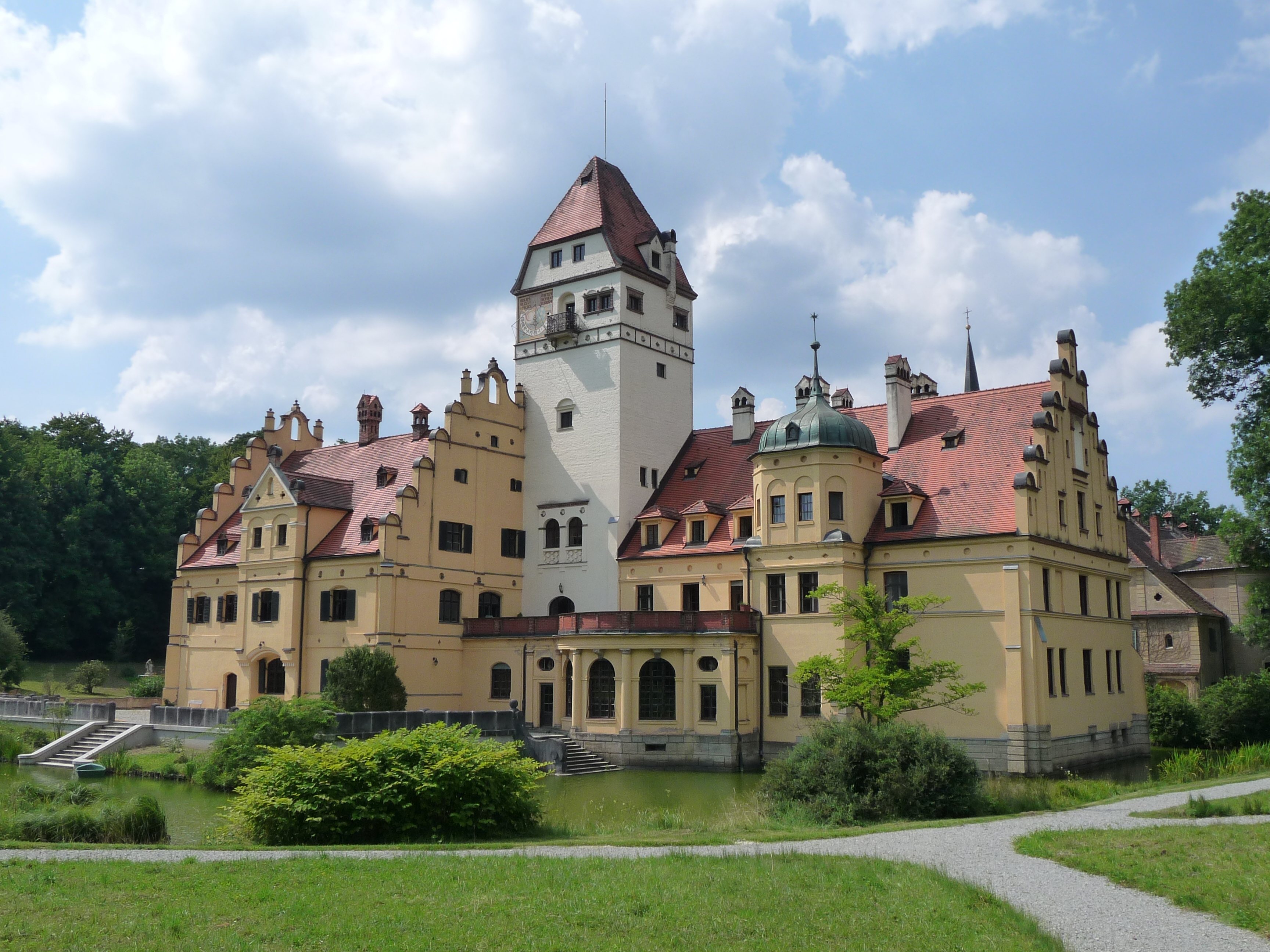 Schönau, Wasserschloss